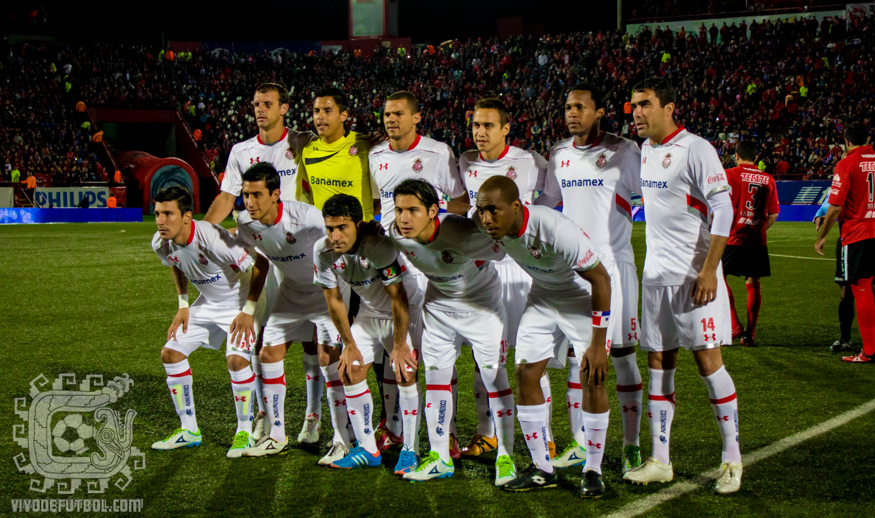 Xolos vs Toluca final